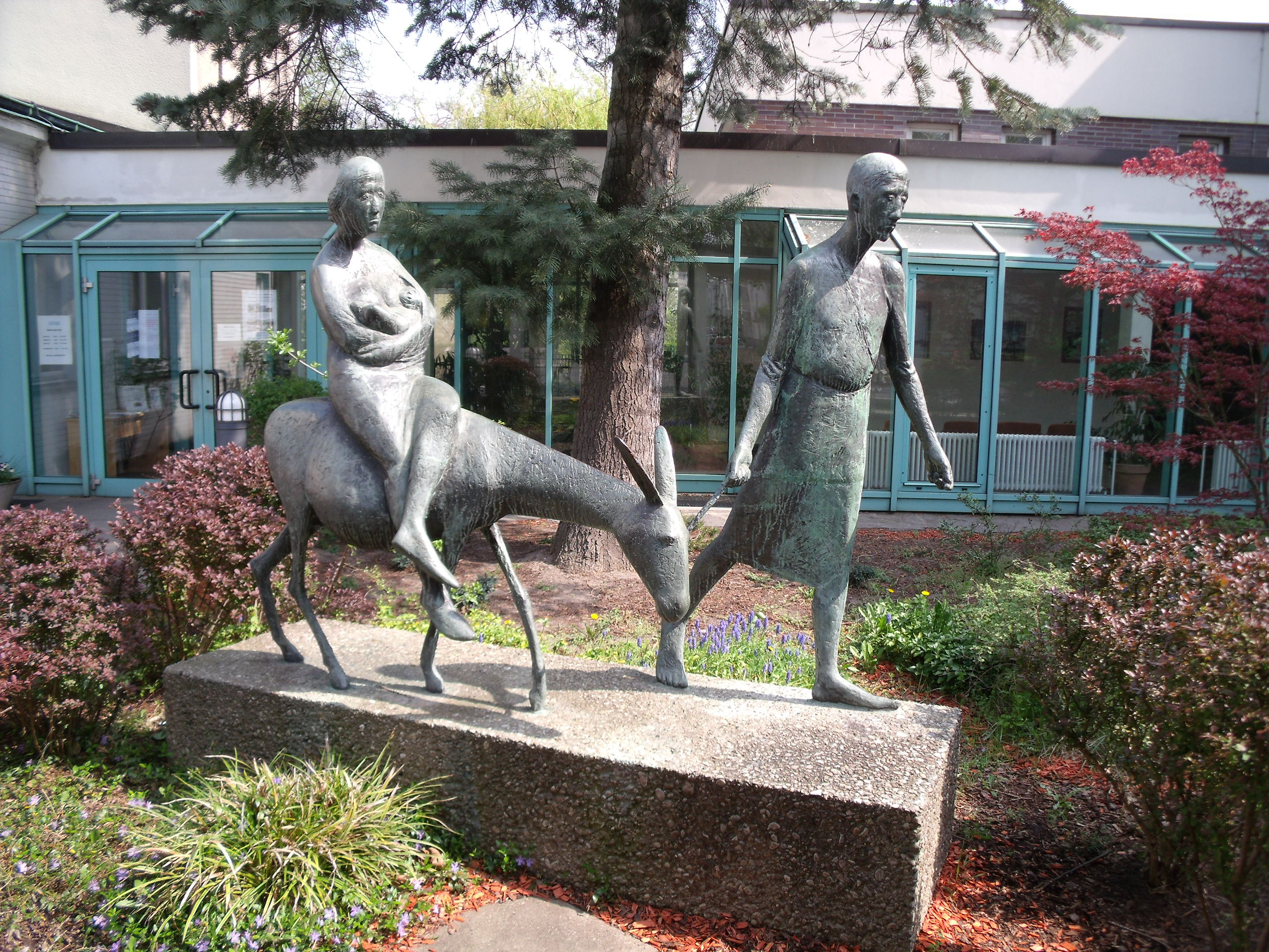 Die Skulptur "Flucht nach Ägypten" des Künstlers Waldemar Otto steht auf dem Vorplatz der Weihnachtskirche in Haselhorst, Berlin.